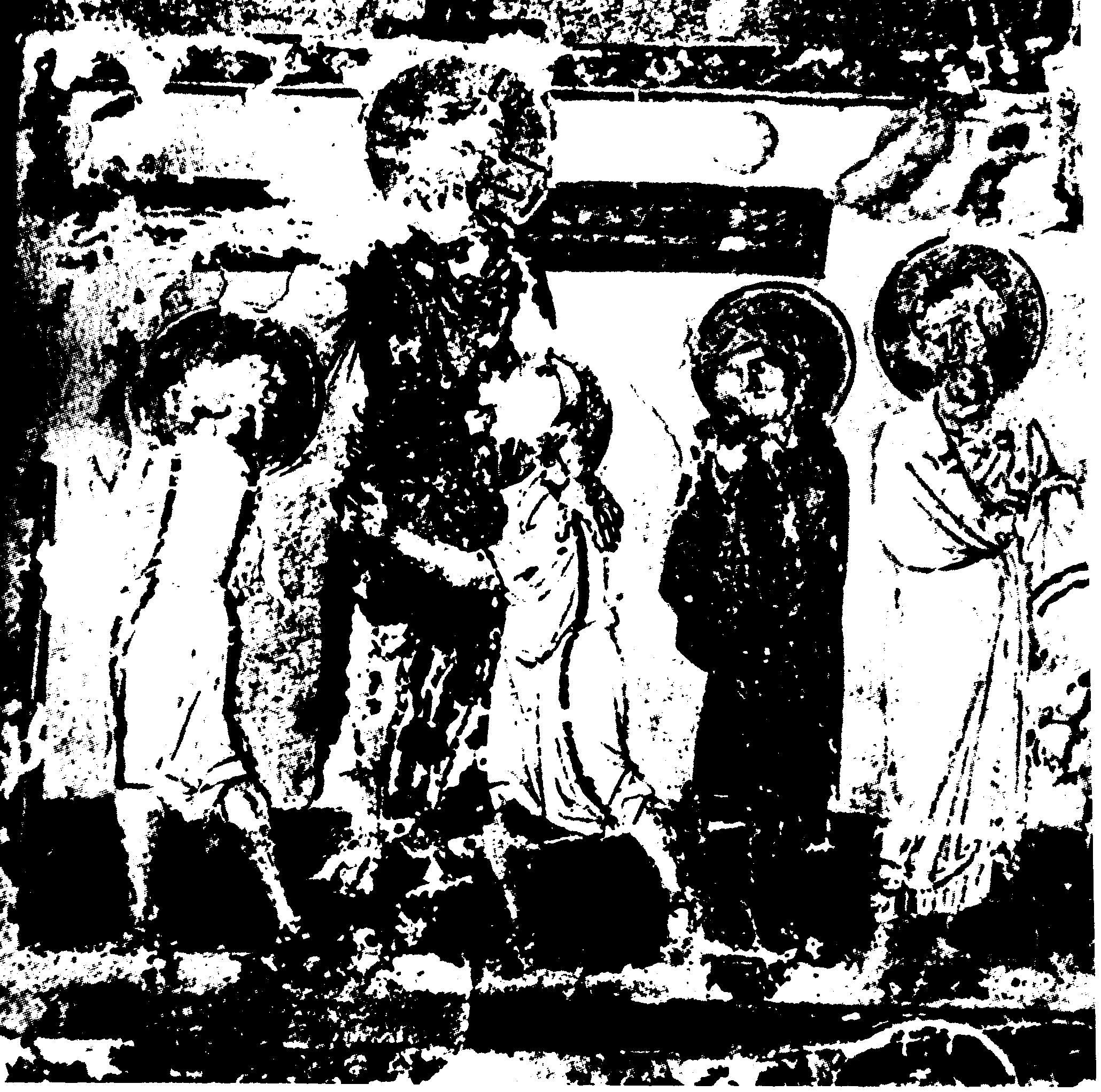 Kreuzabnahmebild (apokathelosis)aus dem Codex des Gregor von Nazianz.883-886.